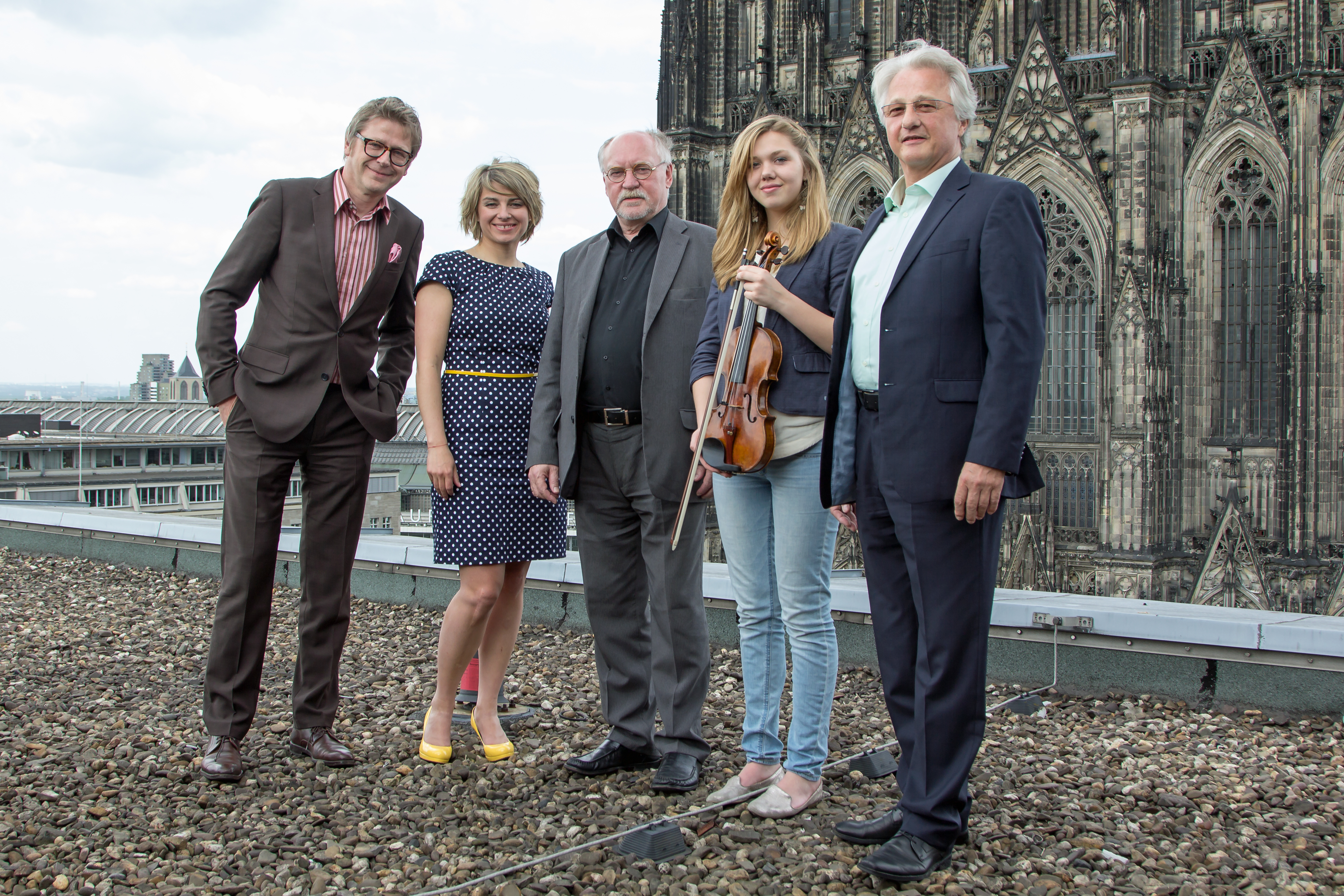 Eurovivions Young Musicians 2014, Gruppenfoto auf dem Dach des WDR-Funkhauses